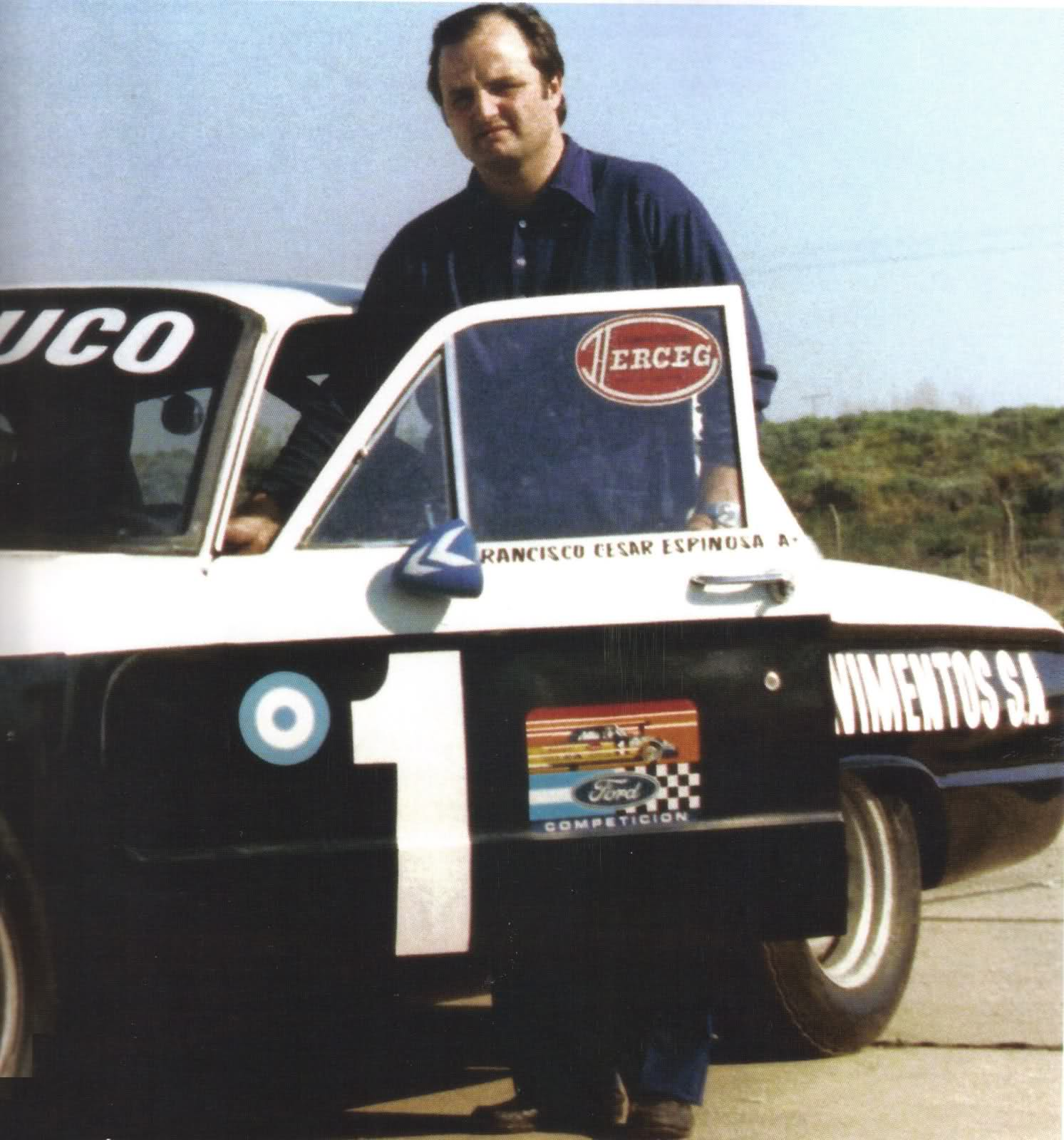 Francisco Espinosa junto a su Ford Falcon de Turismo Carretera, en el año 1980 ó 1981.